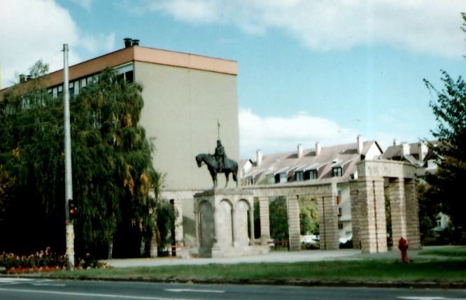 Szent István szobra, Mátészalka